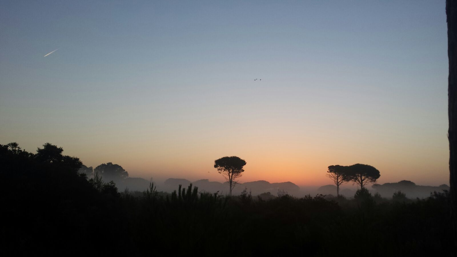 Pinar de Roche This is a photography of a Special Area of Conservation in Spain with the ID: ES6120018. Natura2000 entry, EEA entry